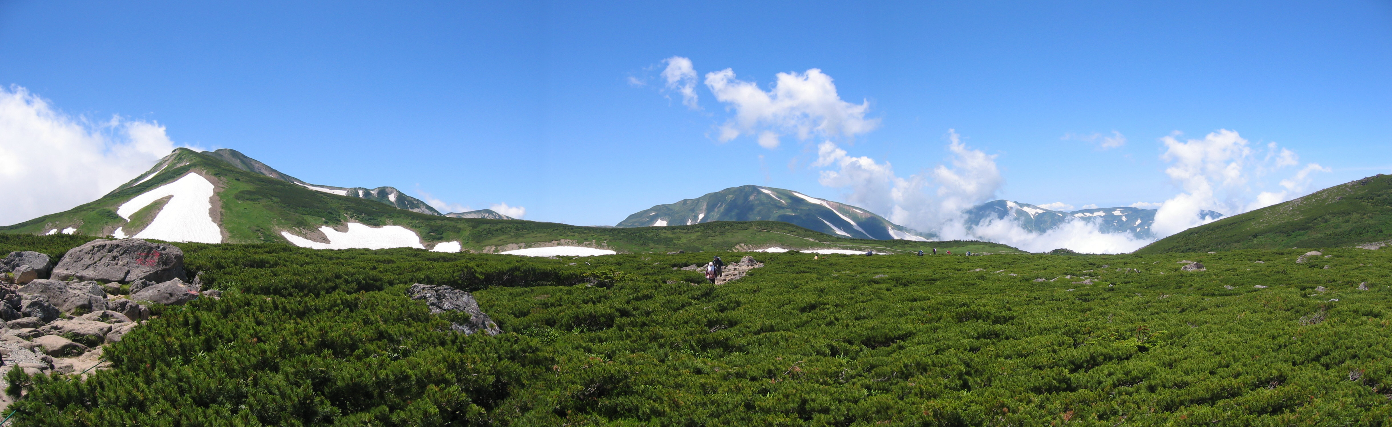 白馬乗鞍岳の頂上